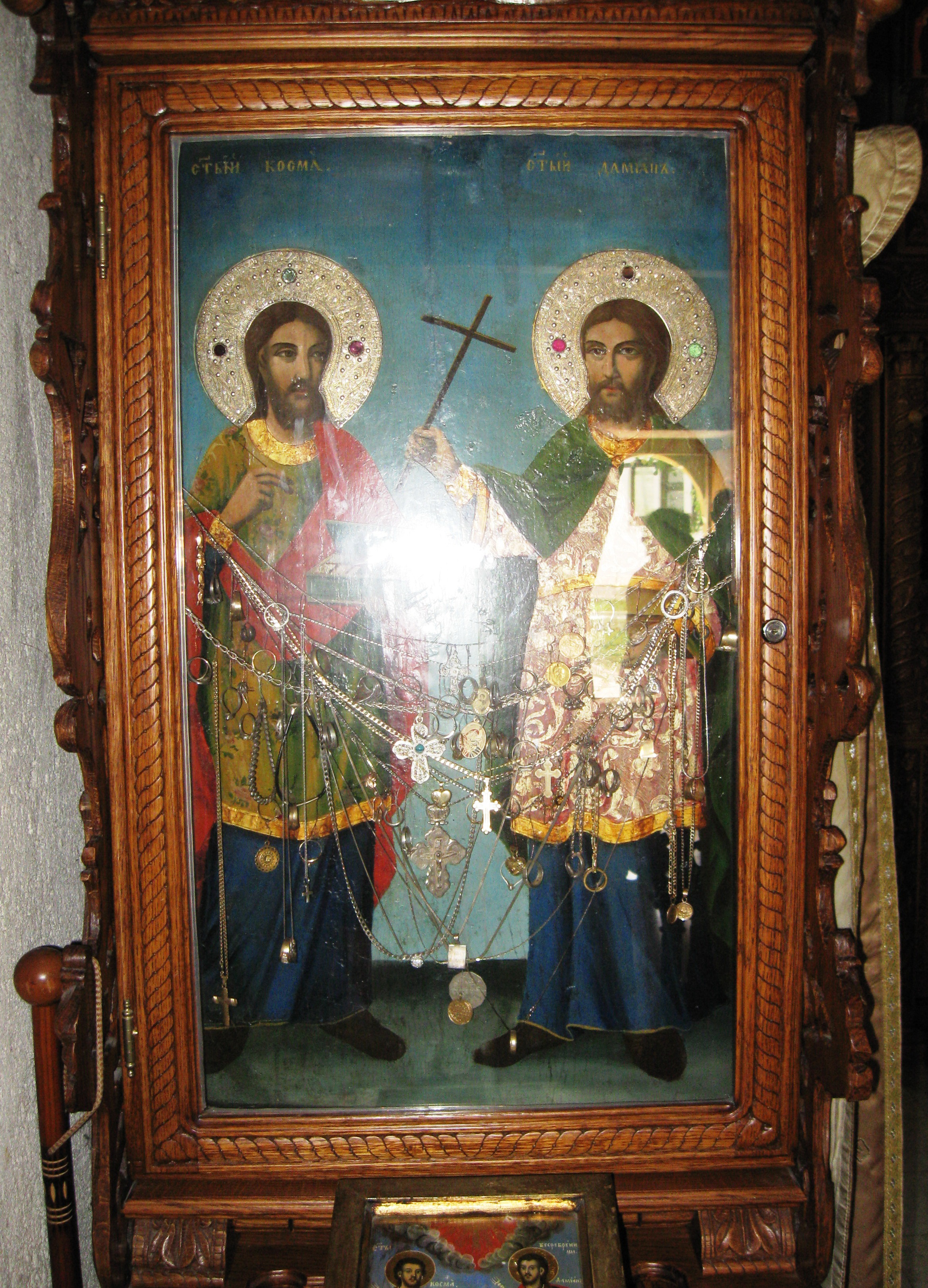 Аутор фотографије Радосав Стојановић